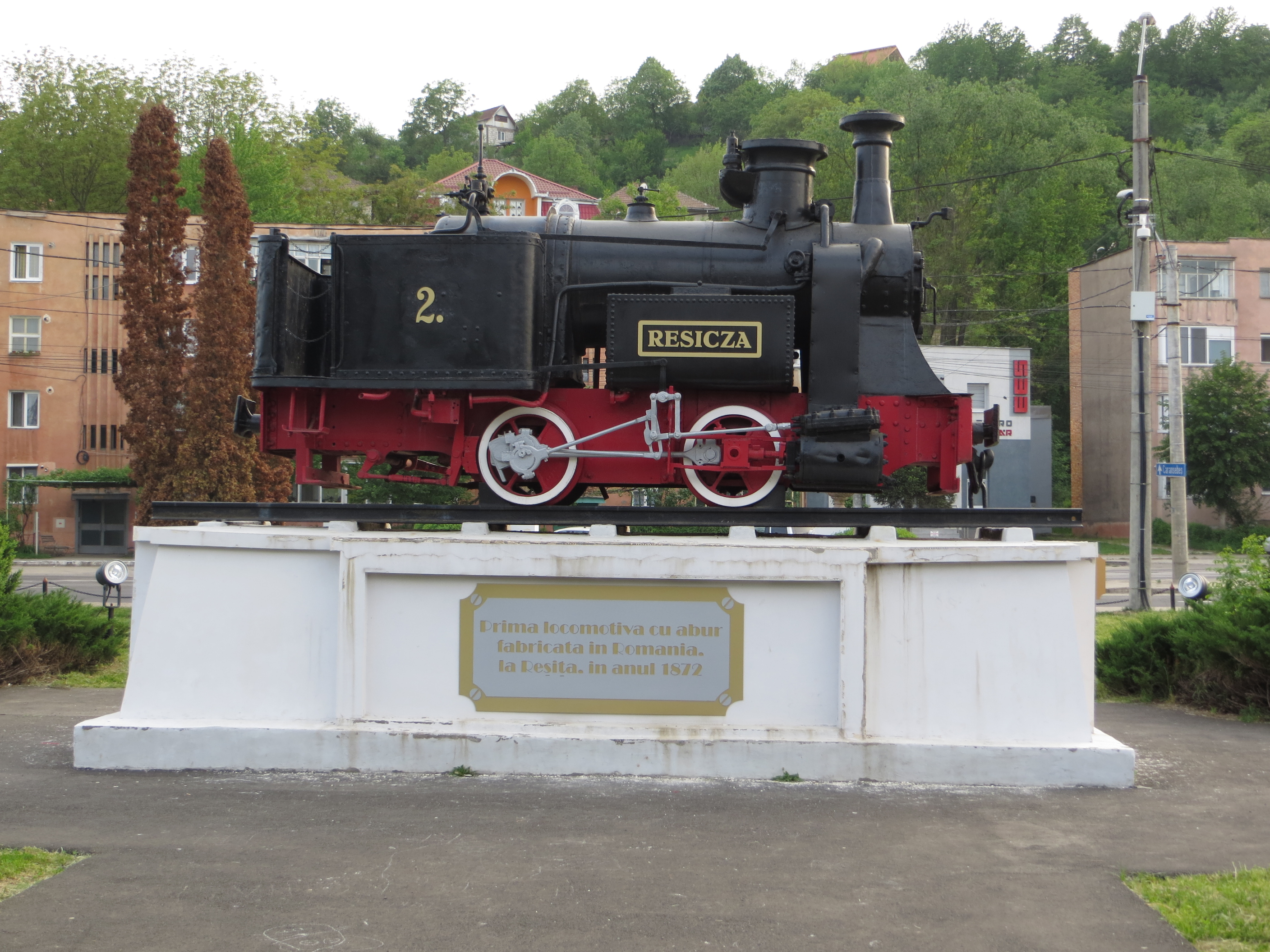 Muzeul locomotivelor cu abur, Reșița